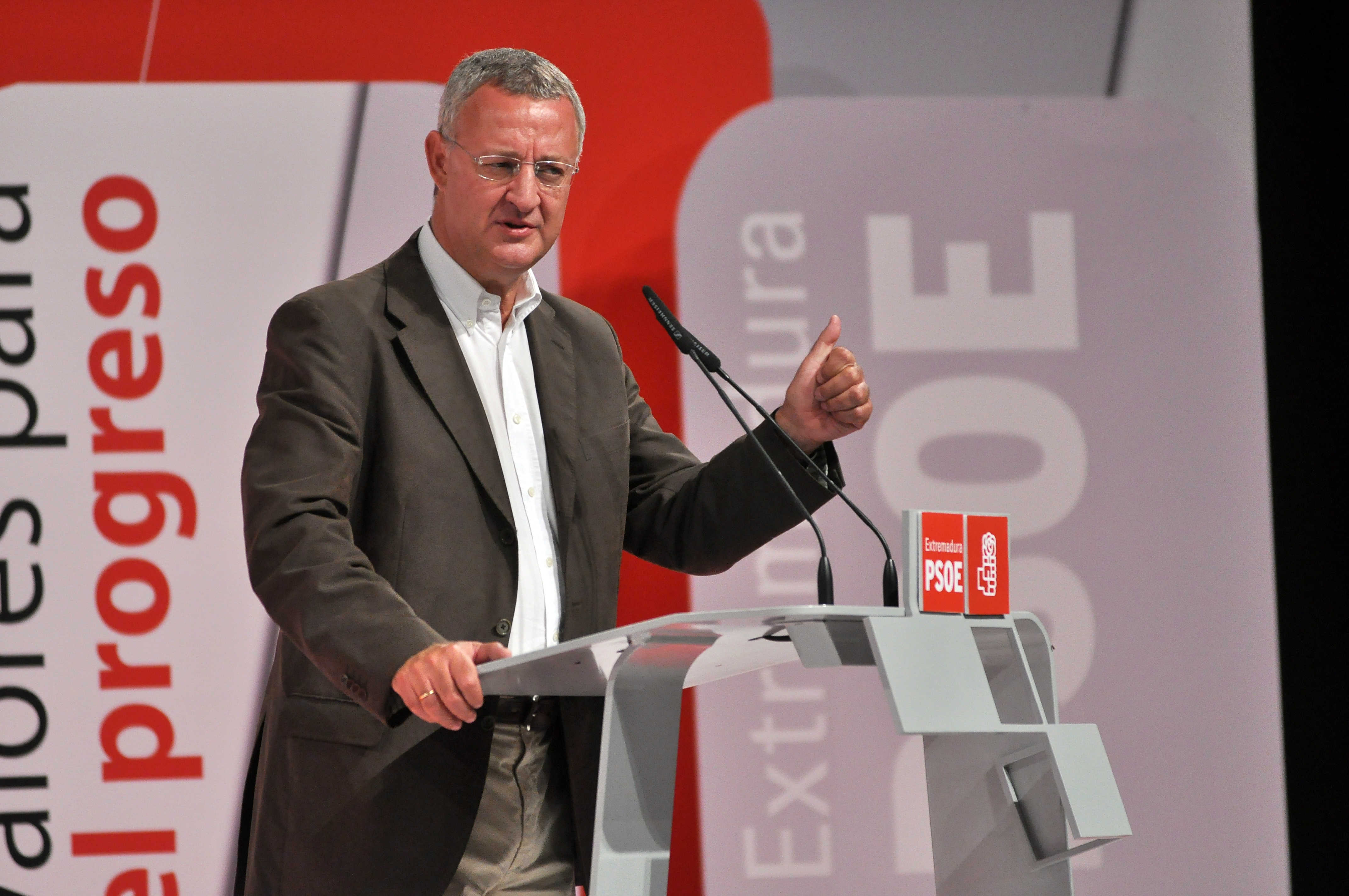 Jesús Caldera en la Conferencia Política del PSOE de Extremadura en septiembre de 2010.